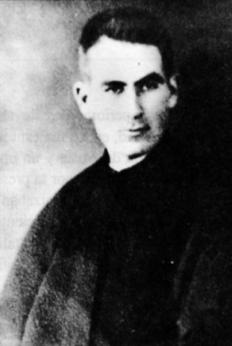 Fotografía del Cardenal Raúl Silva Henríquez en su periódo como Novicio salesiano.